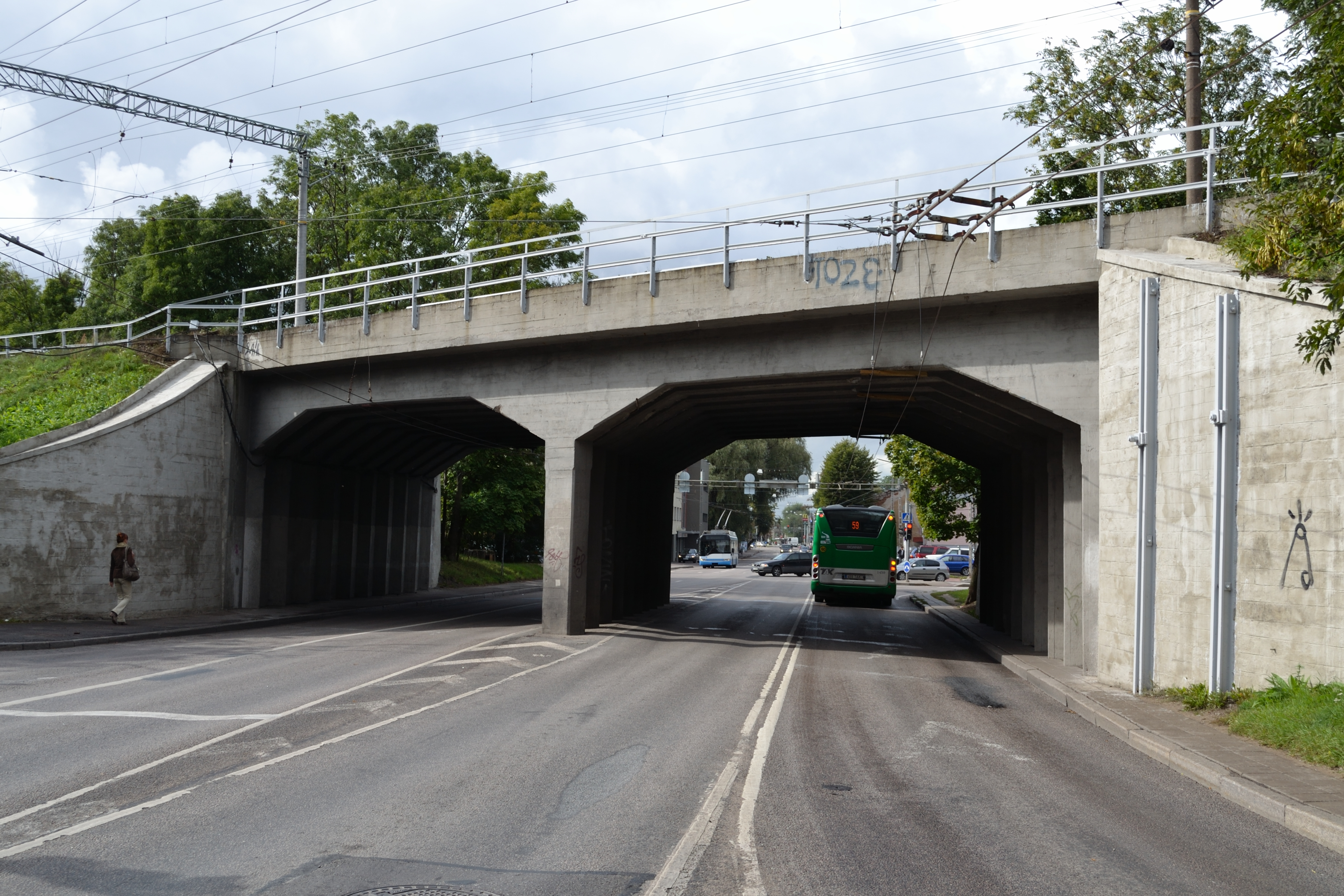 Tallinn, Paldiski maantee raudteeviadukt, 1926